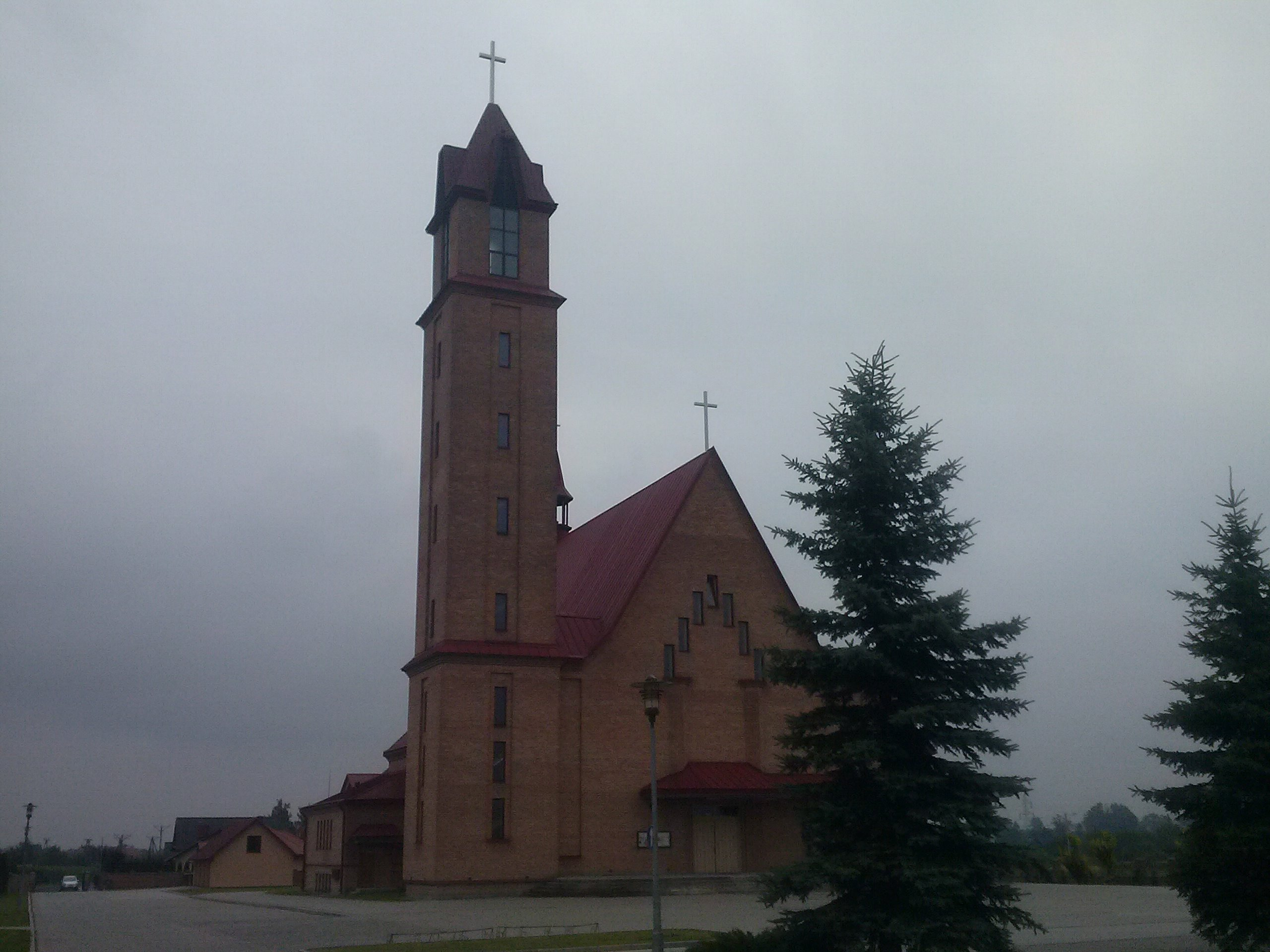 Kościół parafialny pw. Chrystusa Króla w Przeworsku, przy ul. Misiągiewicza